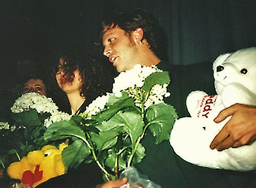 Teddy Award Gewinner, Berlinale 1991: Todd Hayes (Film "Poison") und Jenny Livingston (Doku-Film "Paris is burning") mit Plüschteddy-Preisen im Kant Kino Berlin.